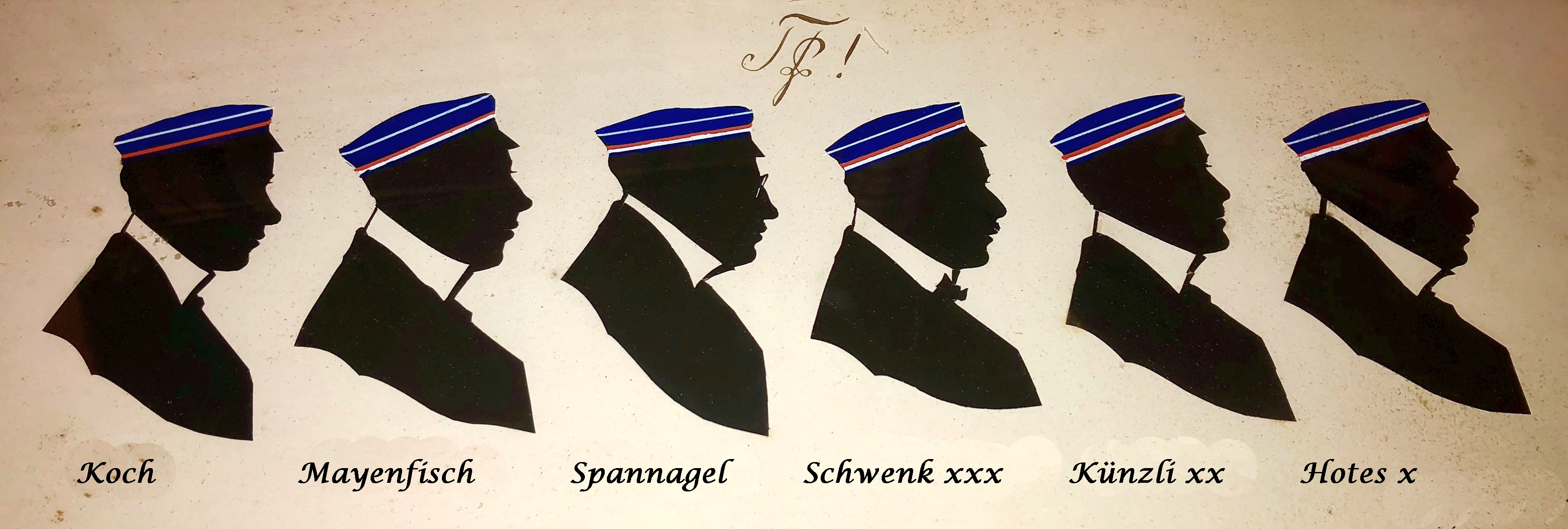 Porträts (teilcolorierte Scherenschnitte) von Mitgliedern der Studentenverbindung "Corps Tigurinia Zürich" im Wintersemester 1902/1903